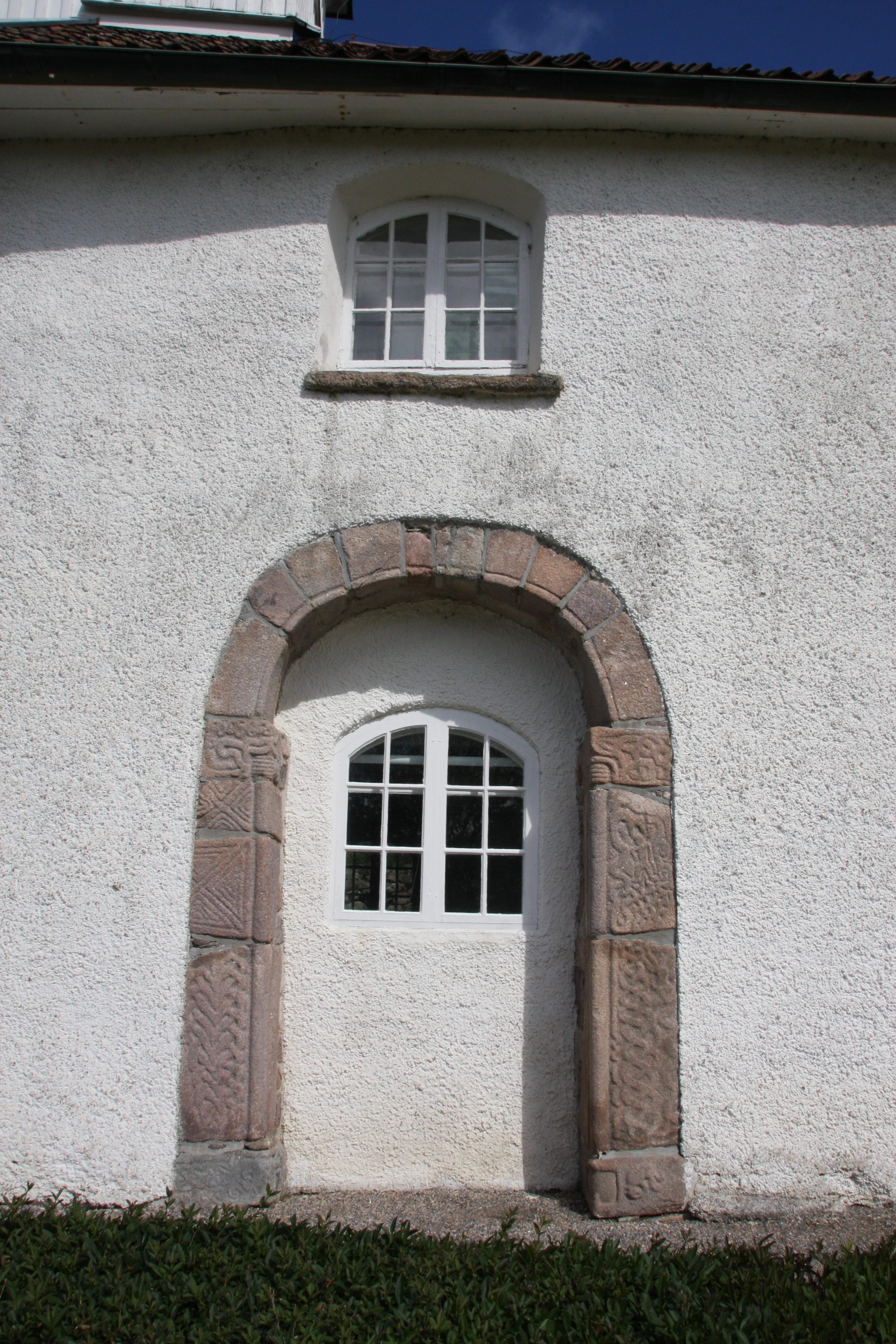 Bottna kyrka i Tanums kommun, Bohuslen.